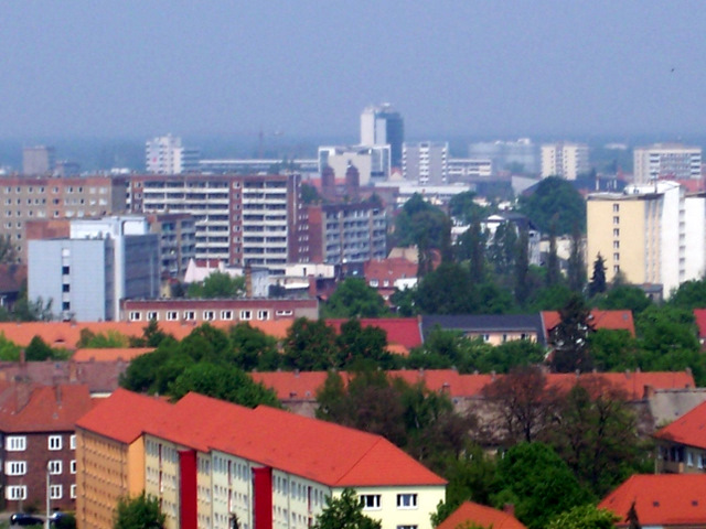 Blick auf das Zentrum von Cottbus